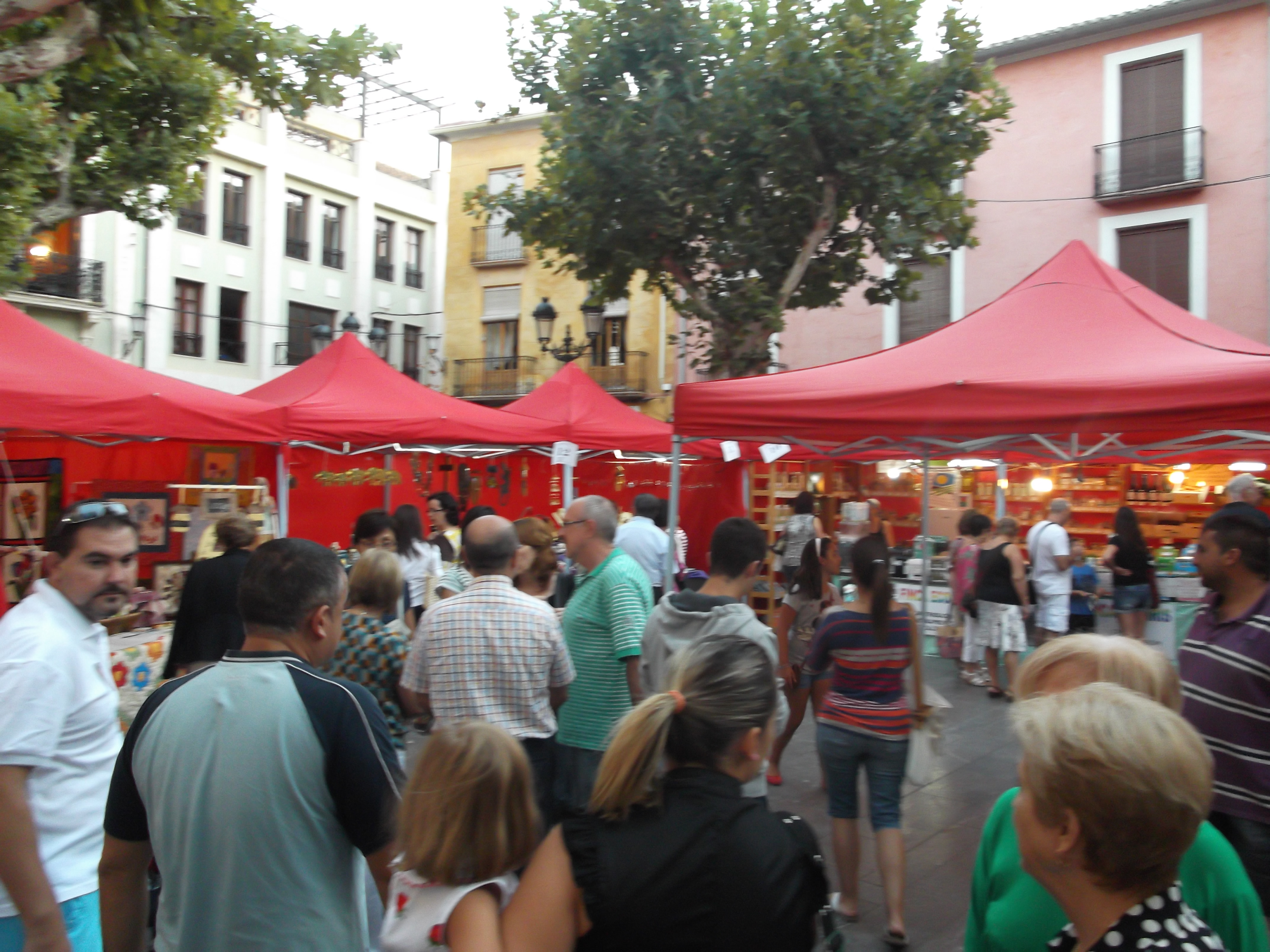 Feria de Artesanía de Septiembre en Honor a la Virgen del Socorro.